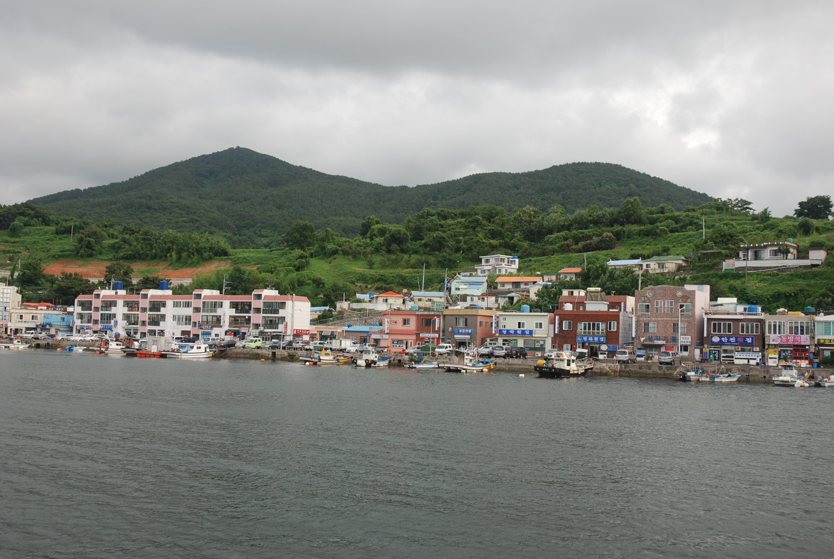 성포마을과 성포항